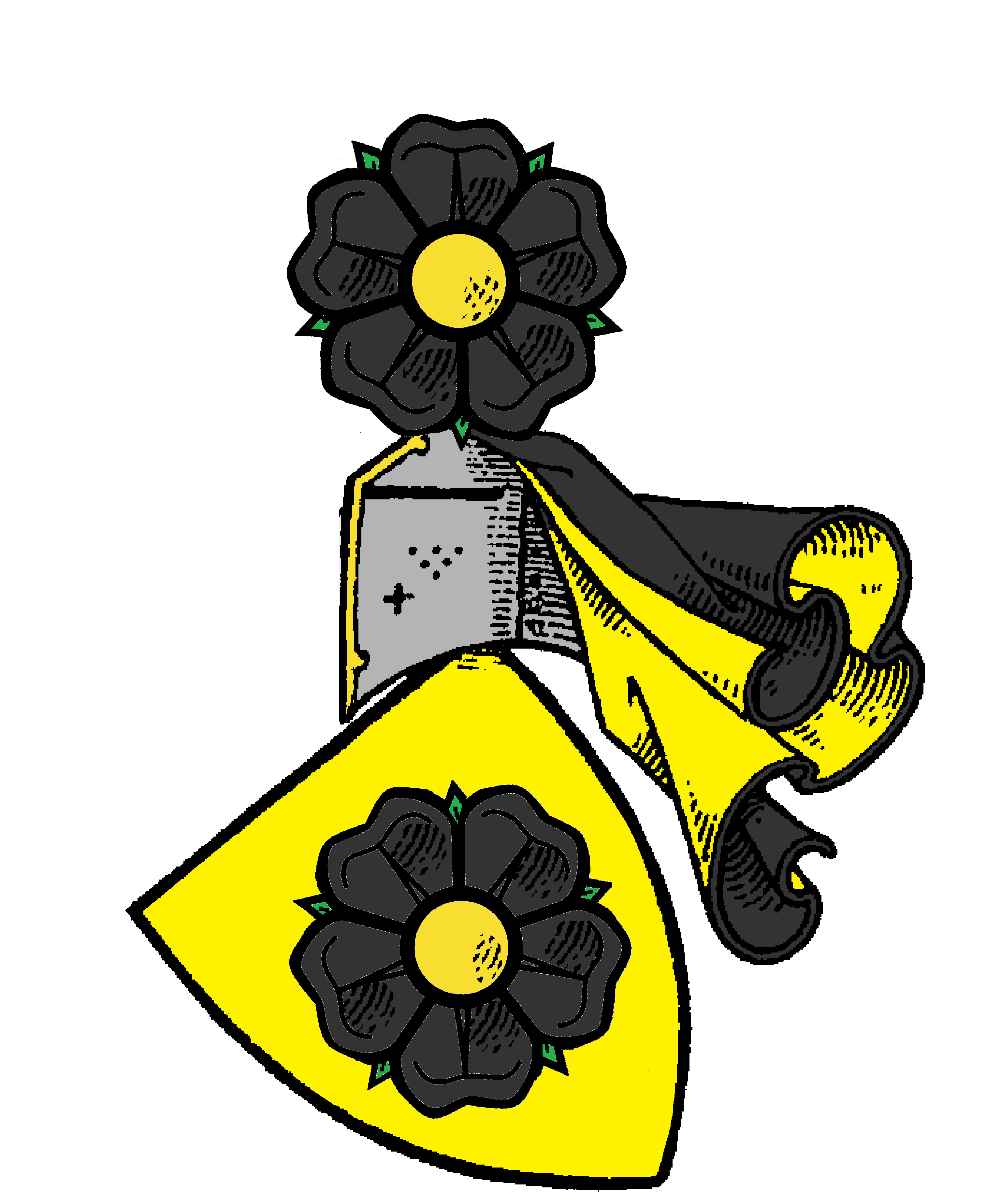 Prostý erb pánů z Ústí